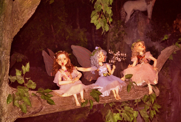 Efteling, Droomvlucht